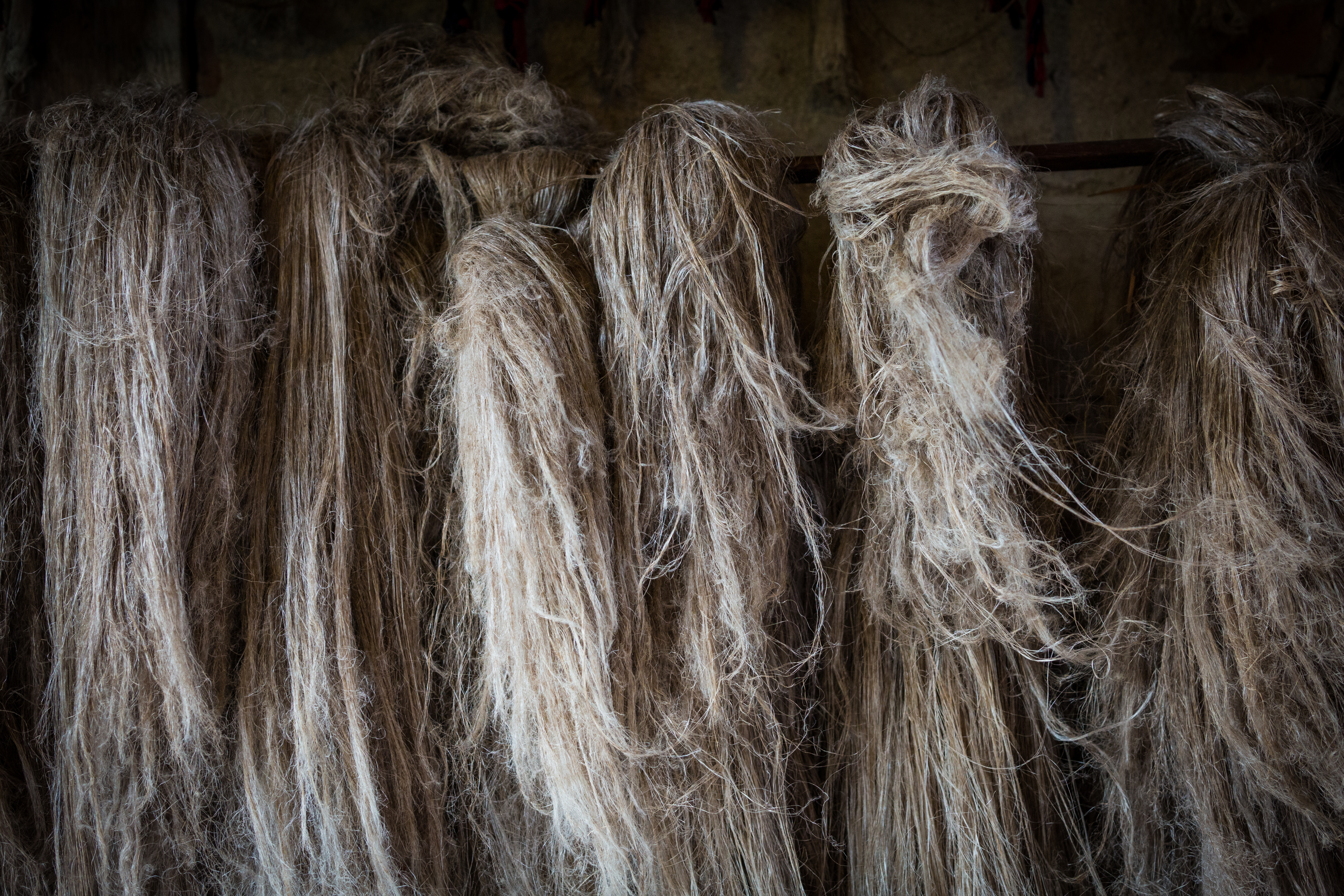 Filasse de lin. Fibres avant filage. Atelier de tissage Michel Gander - Muttersholtz mai 2015